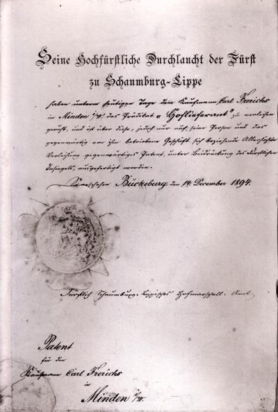 Patent des Hoflieferanten (Schaumburg-Lippe) Carl Frerichs aus Minden, damals Provinz Westfalen in Preußen, heute Nordrhein-Westfalen.